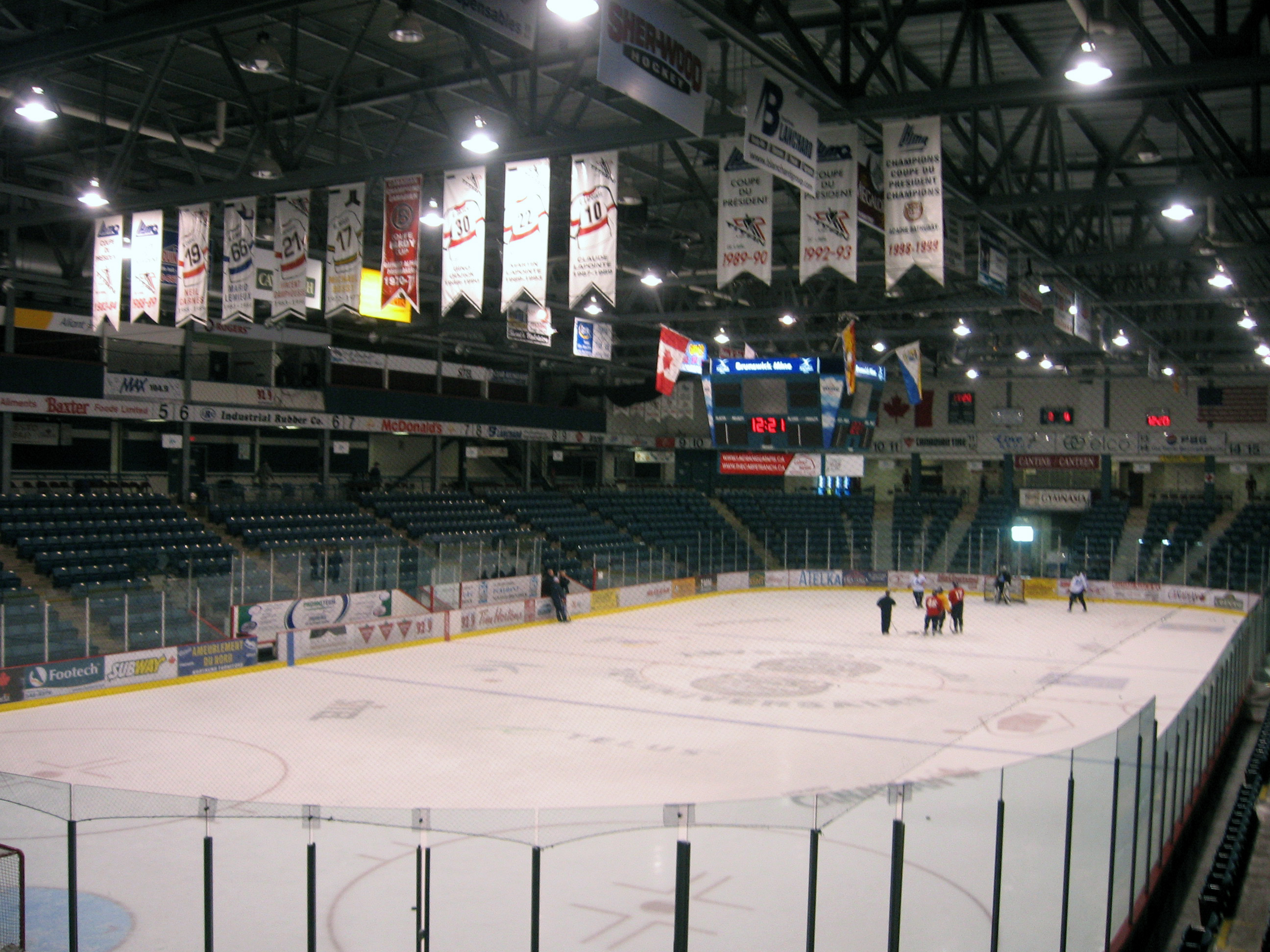 intérieur du Centre régional K.C. Irving, Bathurst (New Brunswick), Canada